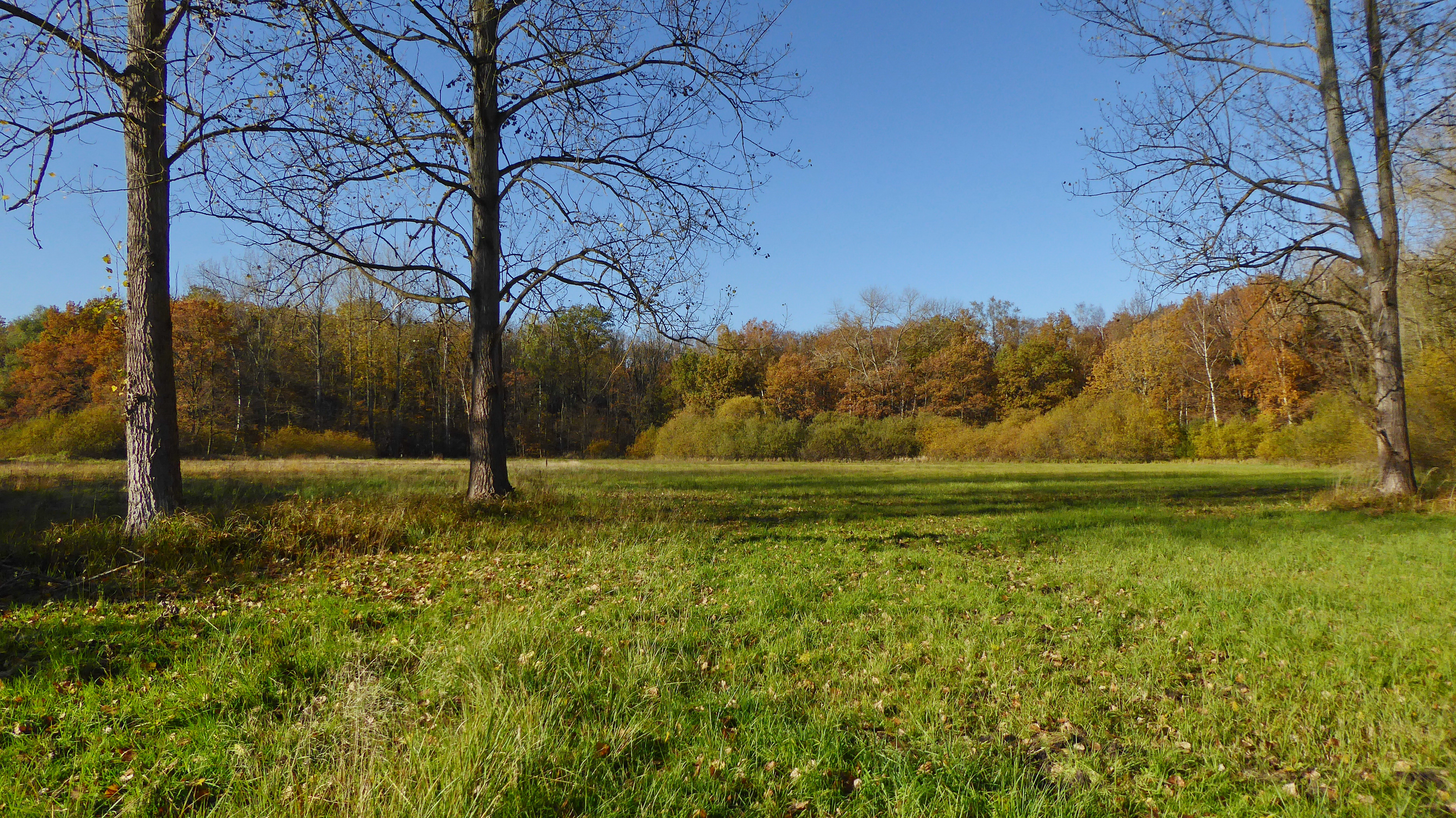 Der zentrale Teil des Naturschutzgebietes Holzwiese-Bockmerholz (NSG HA 064) besteht aus einer nährstoffarmen Nasswiese.